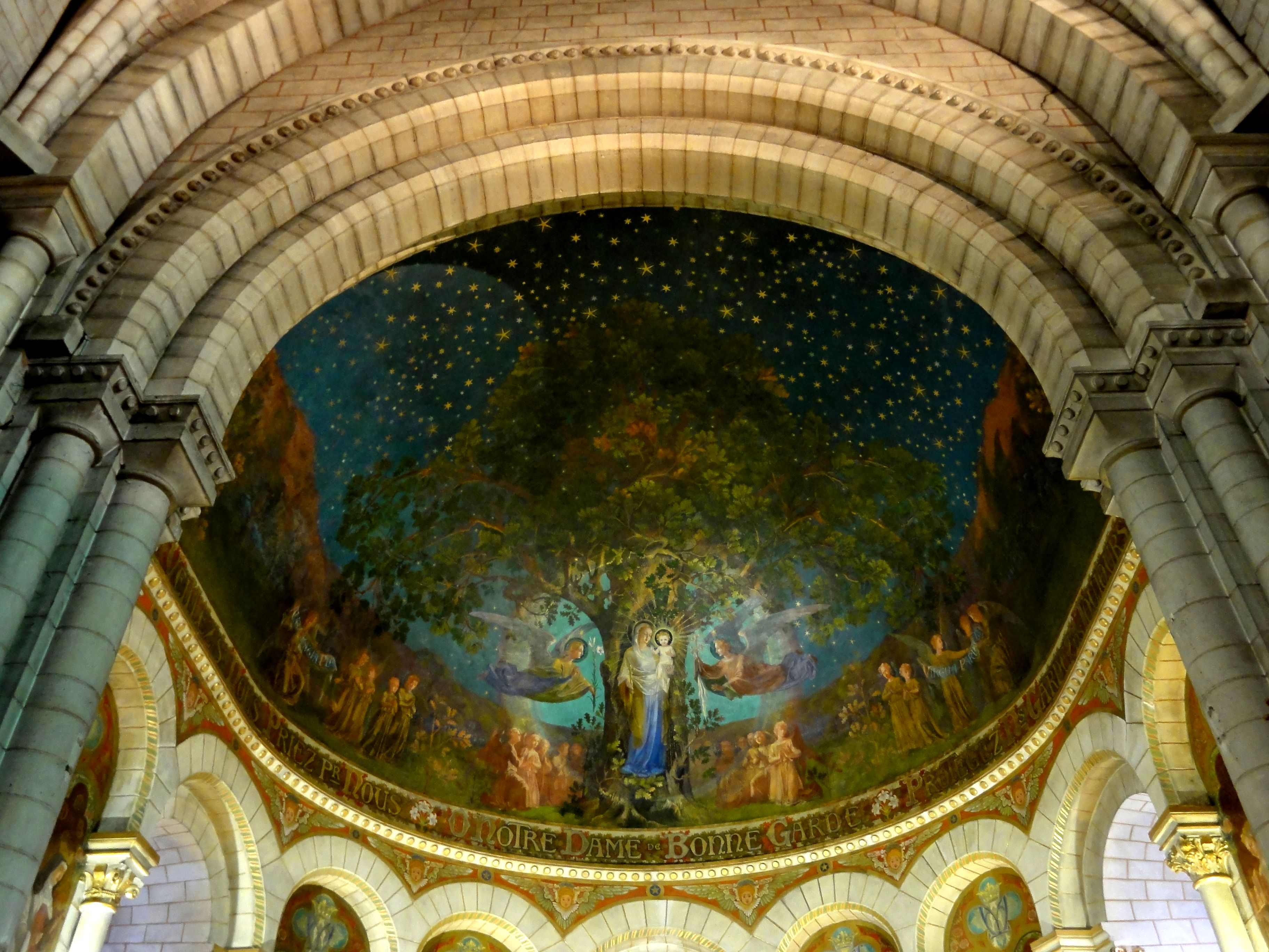 Abside, fresques de François Zbinden.